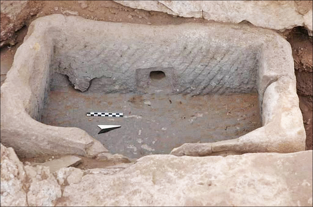 Pétra. Thermes de Biyarah. Petit bassin de pierre.